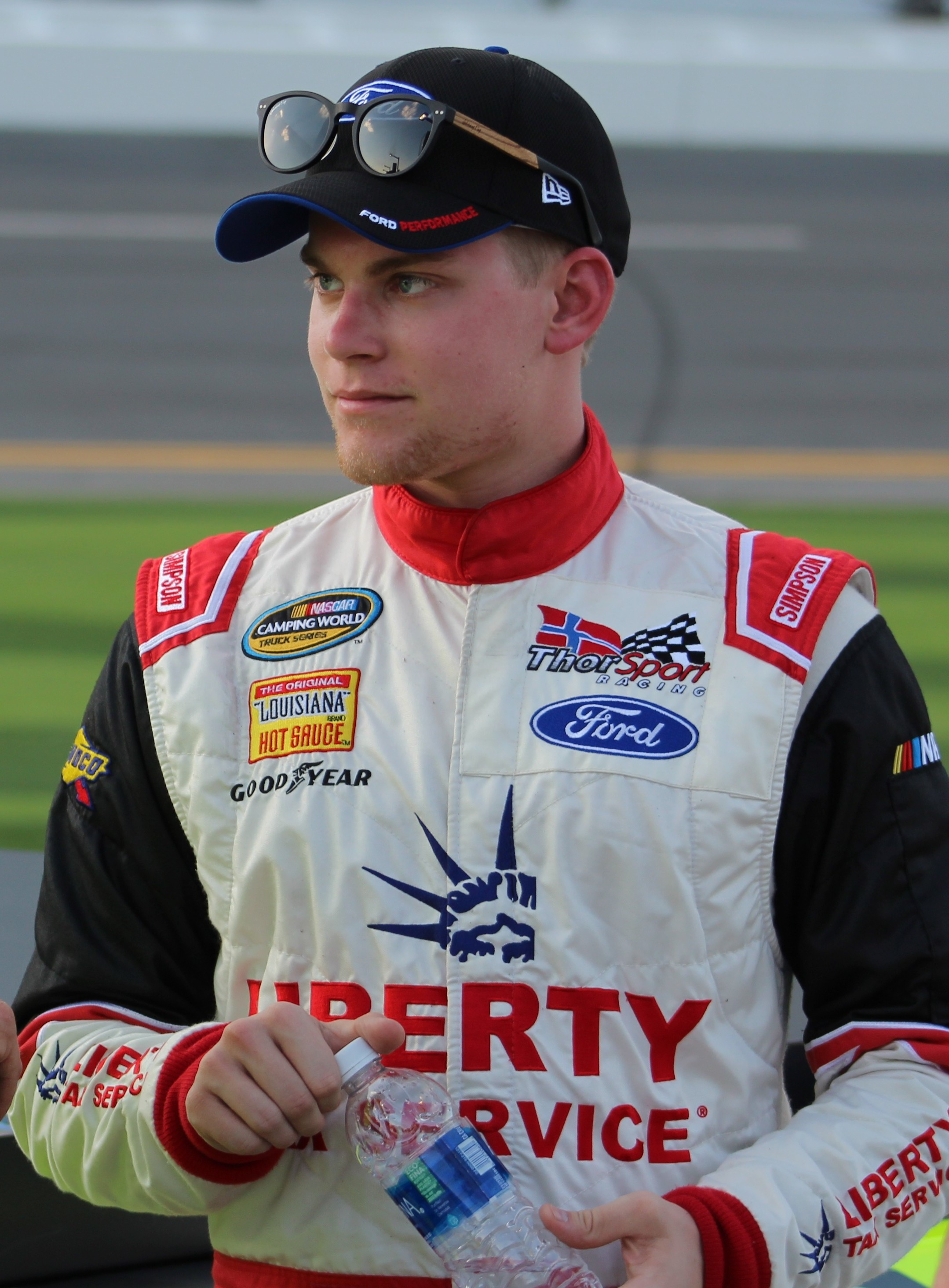 2018 Daytona 500